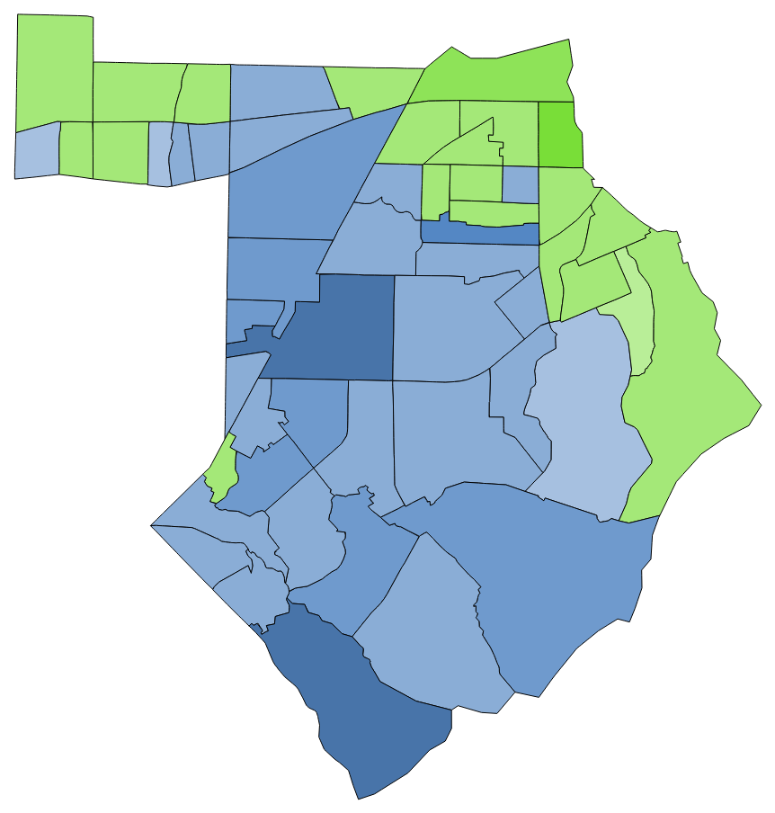 顏色對照表